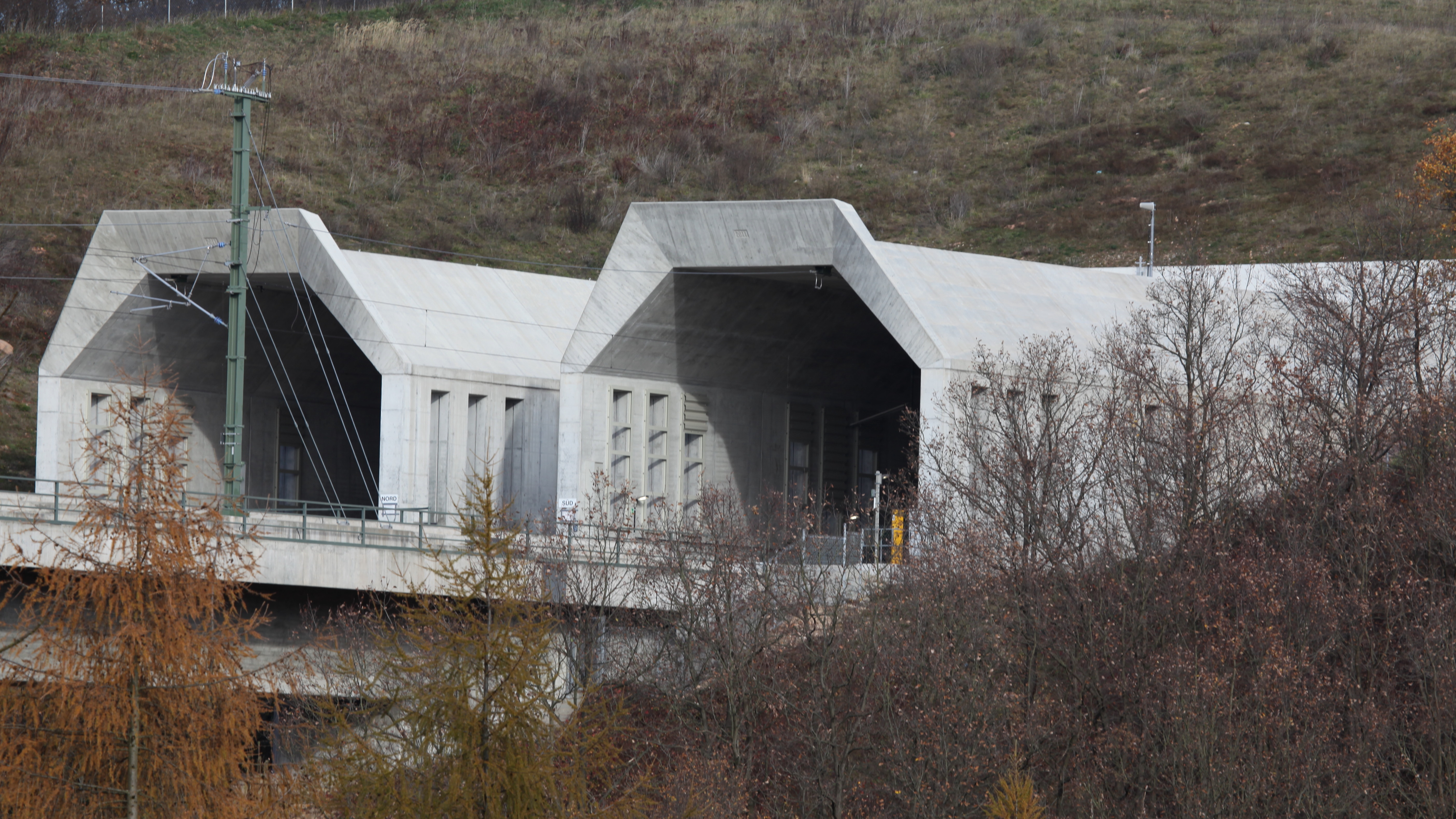 Portal West Bibratunnel